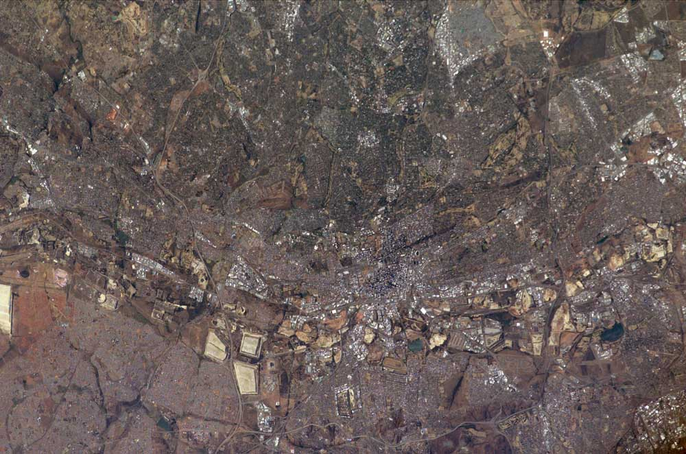 Johannesburg von der ISS aus betrachtet